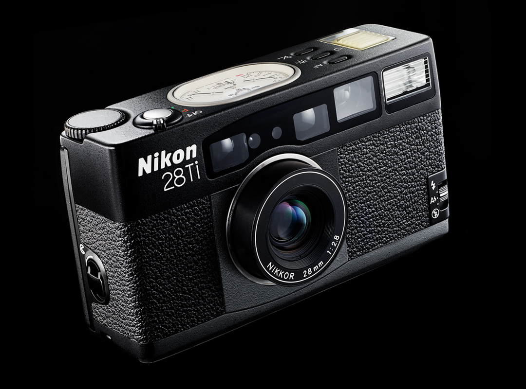 Nikon 28ti Camera